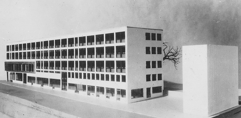 Modellen för Orgelpipan 4 (Klarabergsgatan 33–35)